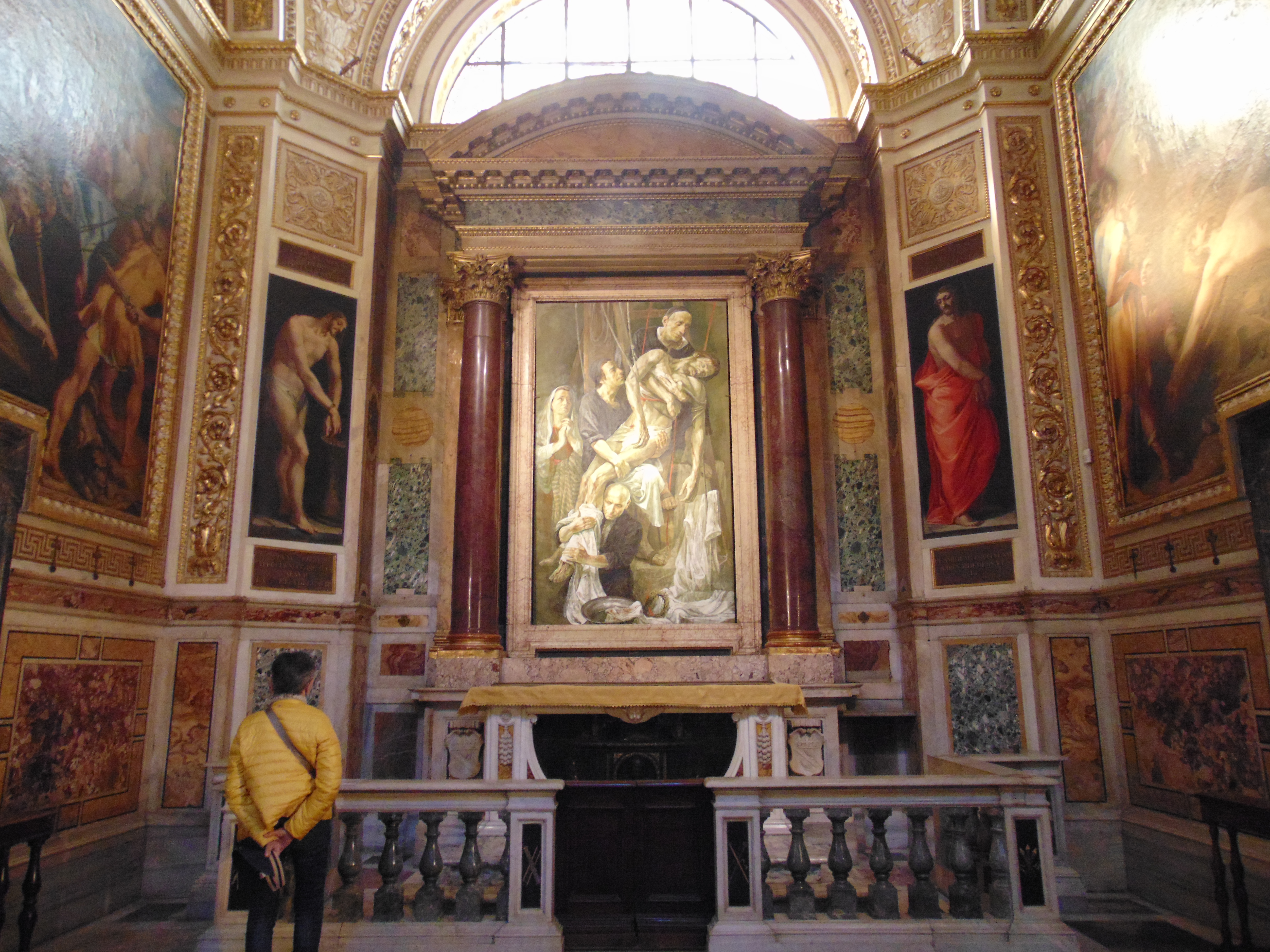 Chiesa del Gesù